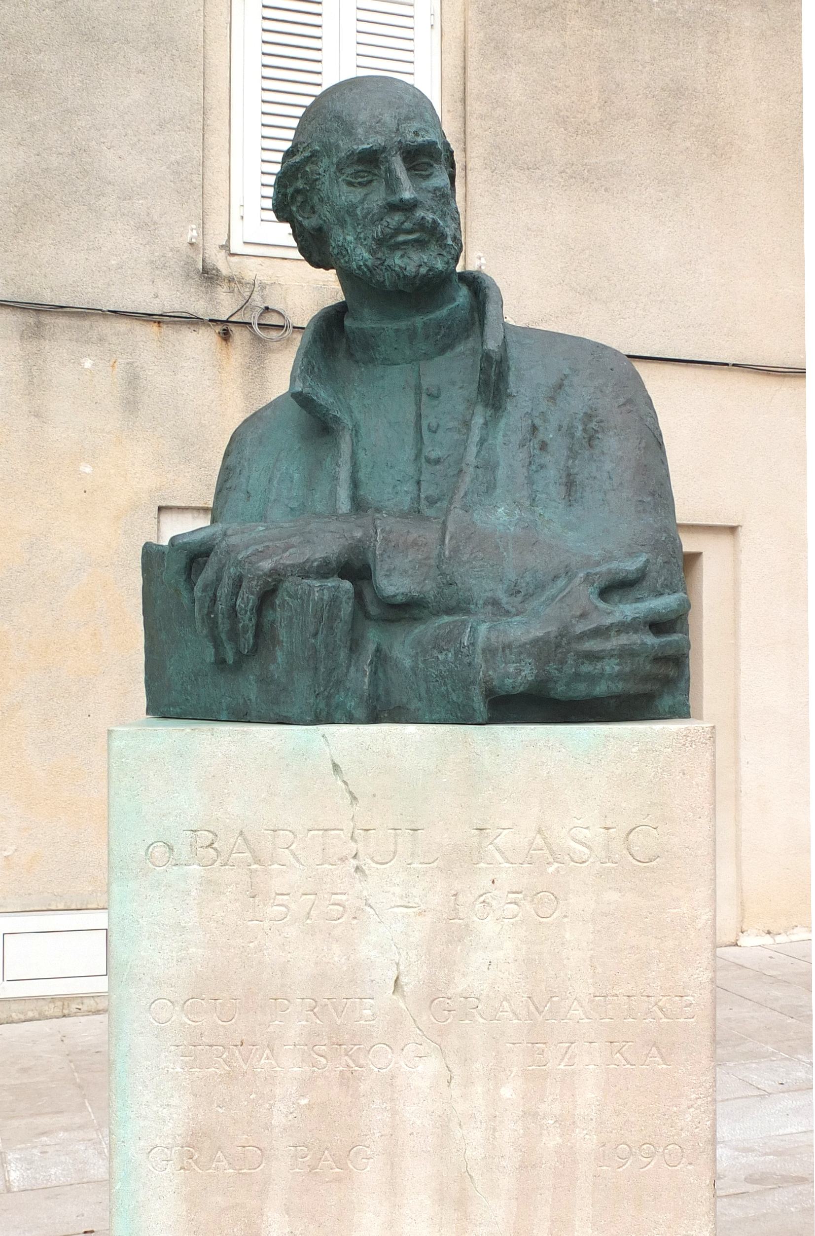 Bronze bust of Bartol Kašić, in Pag (town), Croatia.